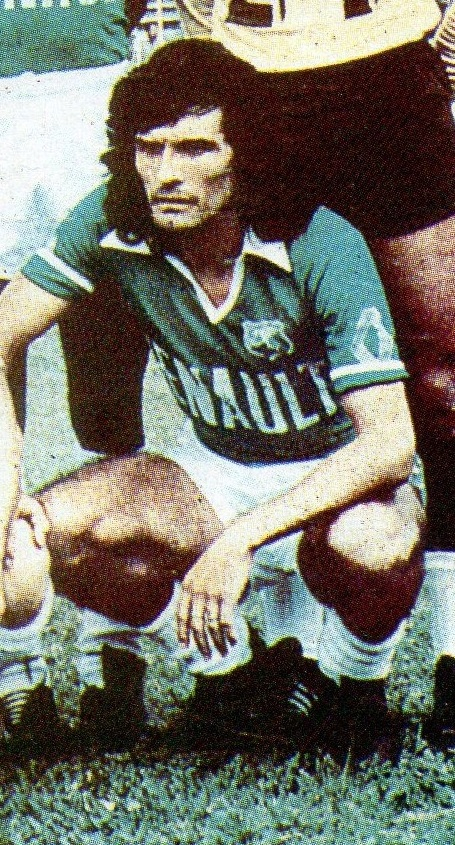 1978Alberto_Benitez